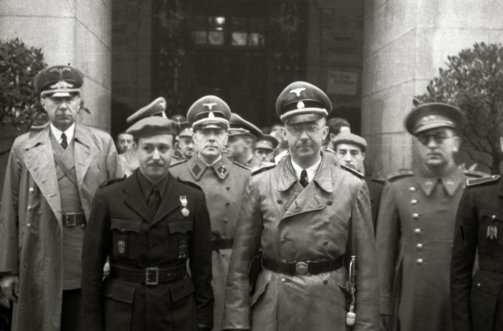 Título original: Autoridades alemanas como el ministro de Interior Heinrich Himmler (3/3) Localización: San Sebastián (Guipúzcoa)